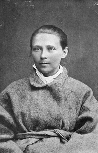 Praskov'ja Semenovna Ivanovskaja (1852-1935)